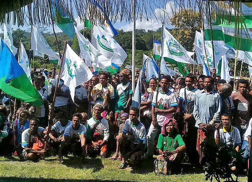 Wahlkampfveranstaltung der AMP in Oesilo, Oecusse, Osttimor